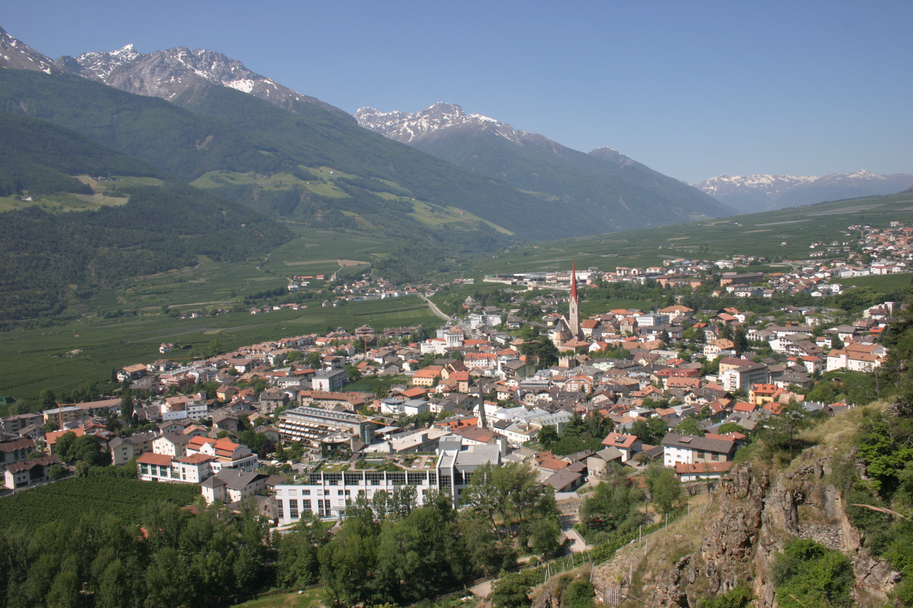 Schlanders City